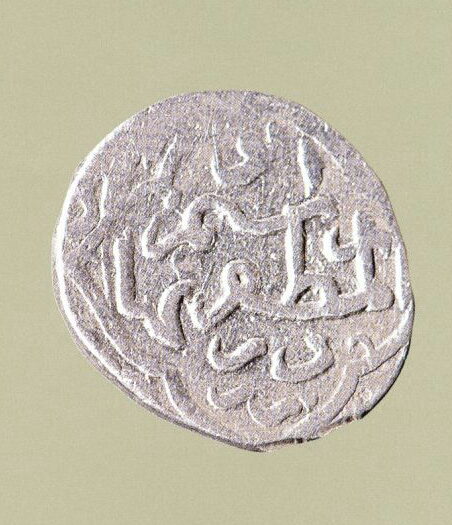 Ağqoyunlu Murad , təngə, gümüş